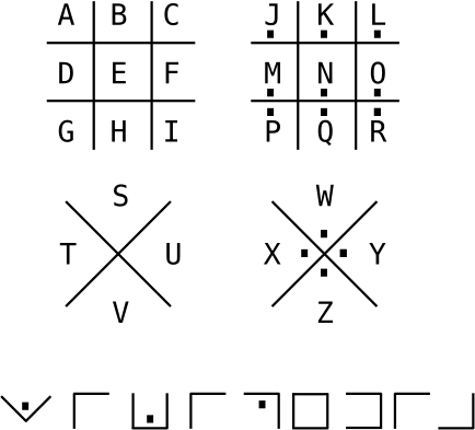 Exemple de chiffrement de type "pigpen"